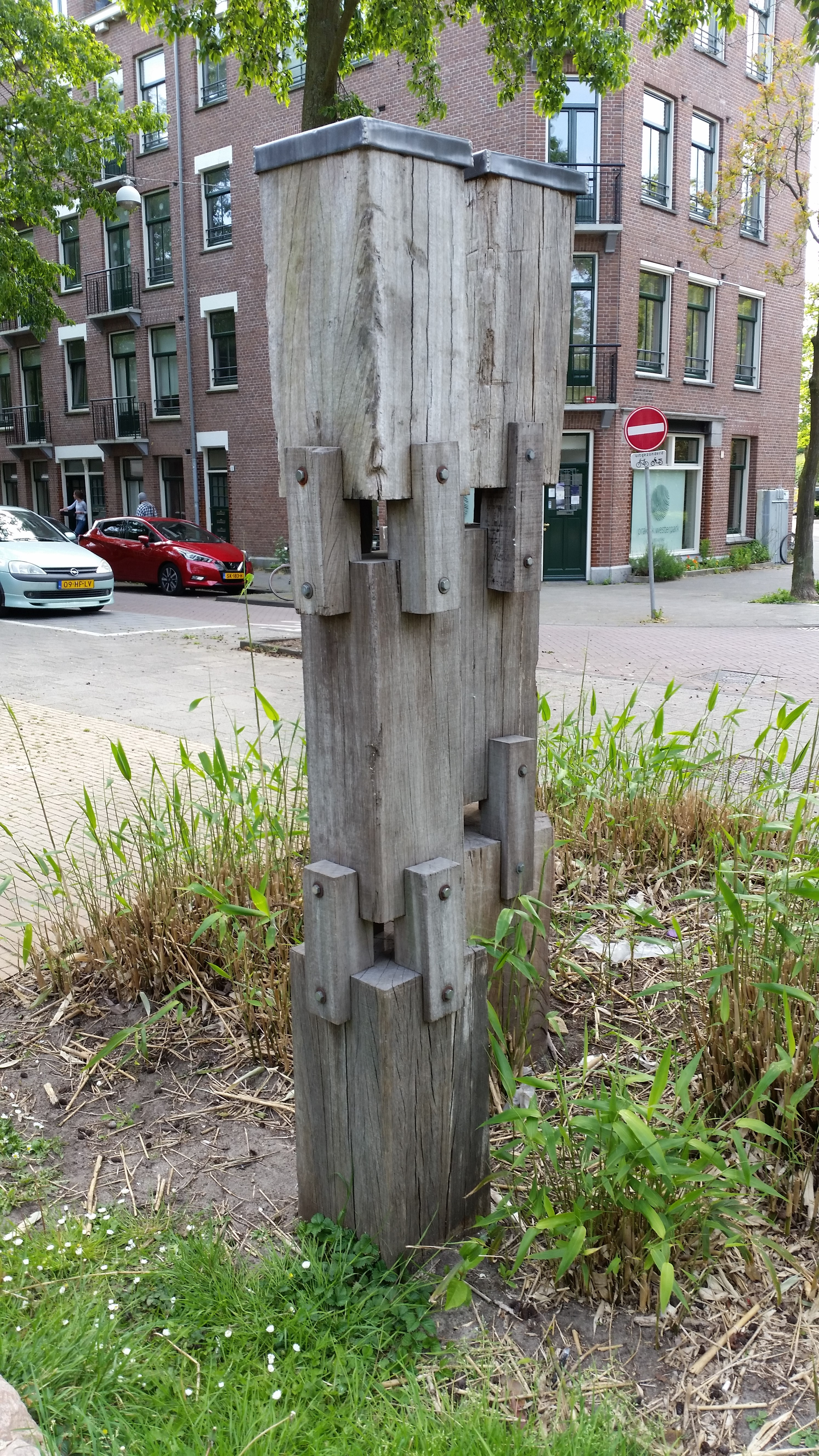 Titelloos beeld van Jan Wolkers in de Jan Wolkerstuin nadat de plantsoenendienst heeft gesnoeid.